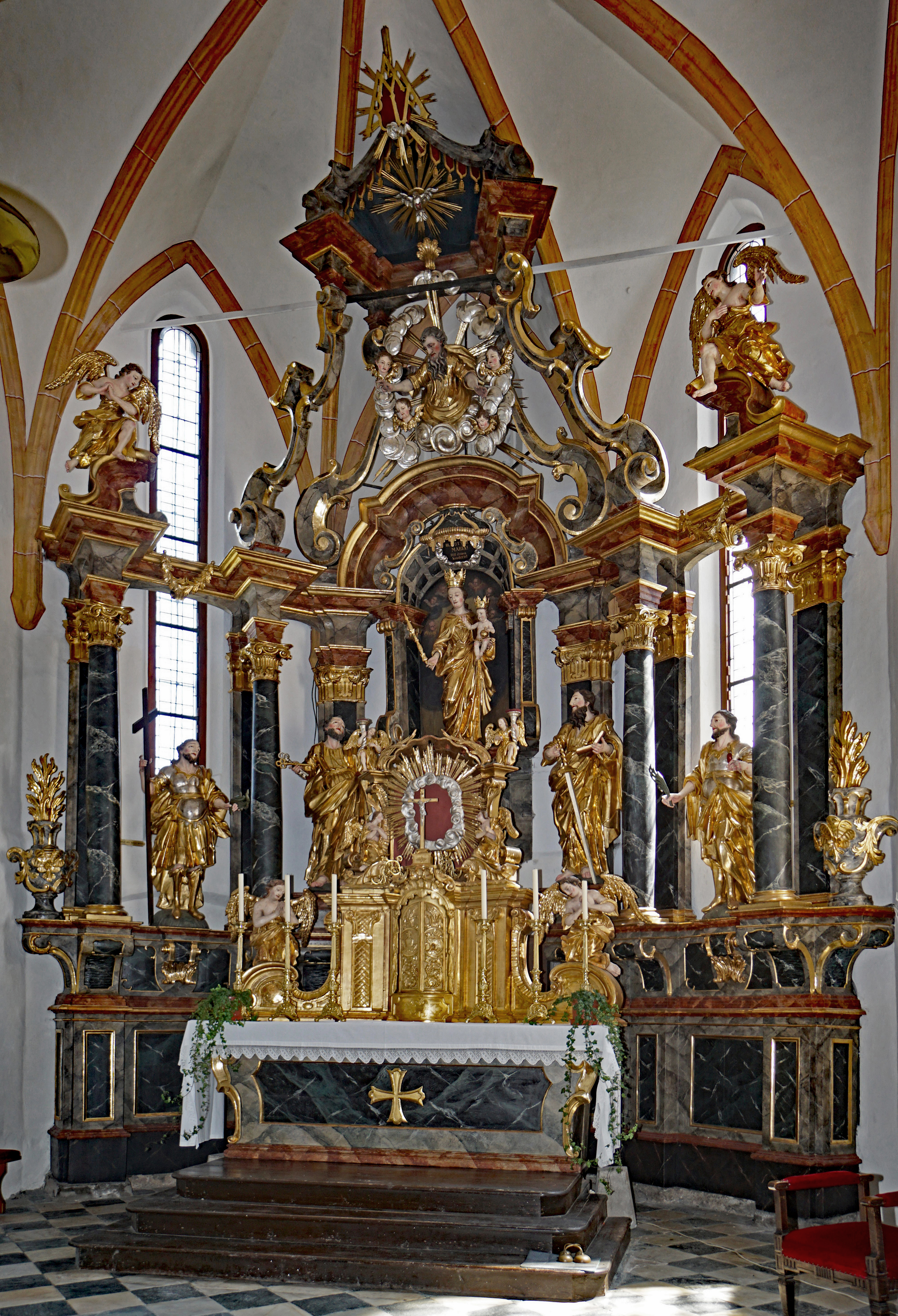 Pfarrkirche Maria im Dorn (Feldkirchen in Kärnten), der barocke Hochaltar